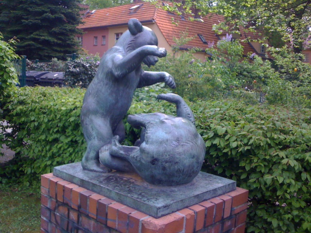 Die Skulptur "Spielende Bären" des Künstlers Wilhelm von Winterfeld steht in der Siemensstadt im Innenhof der Siedlung zwischen der Rapsstraße und dem Rohrdamm.